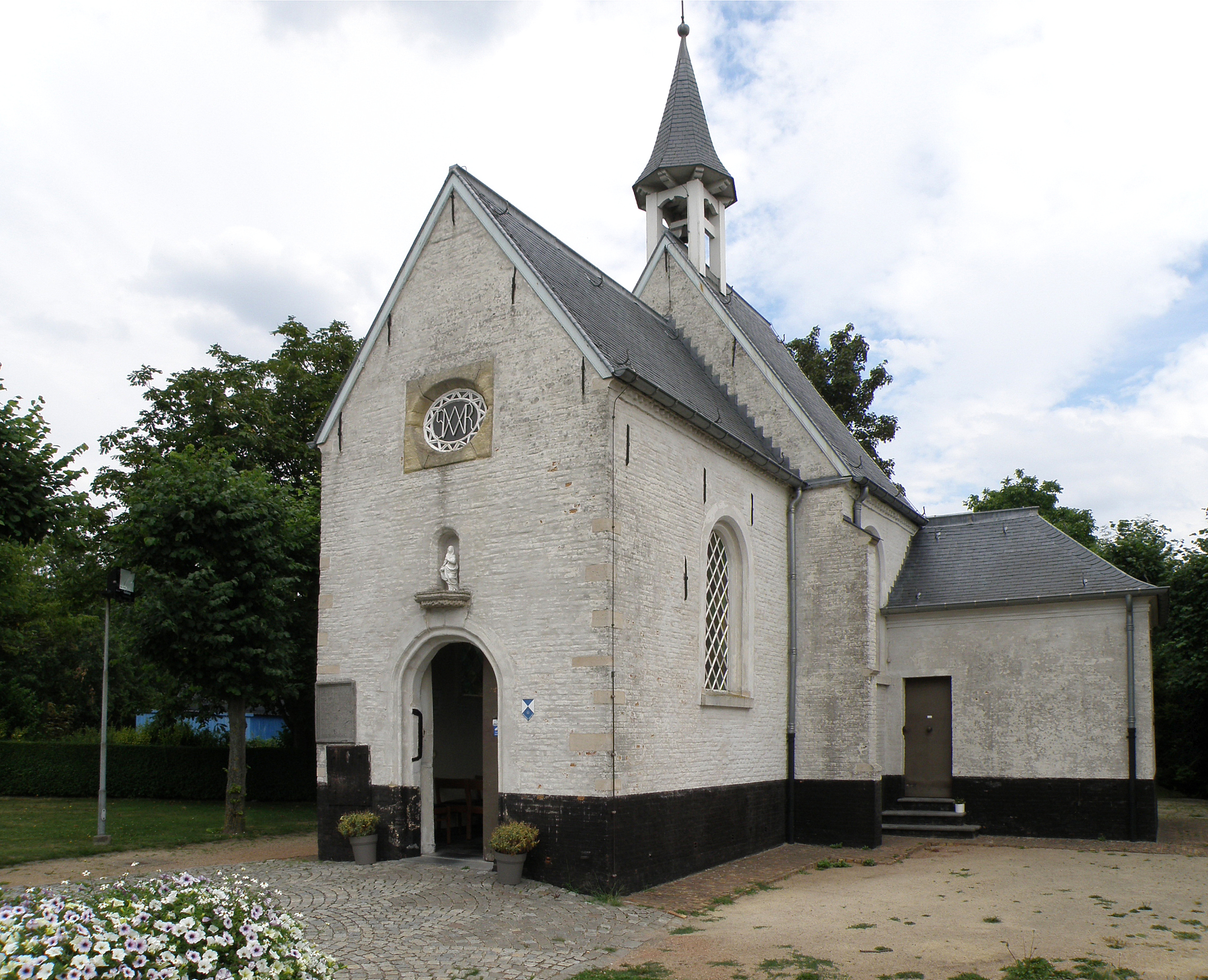 Schelle (prov. Antwerpen, België). Kapel Onze-Lieve-Vrouw van Smarten of Laarkapel.